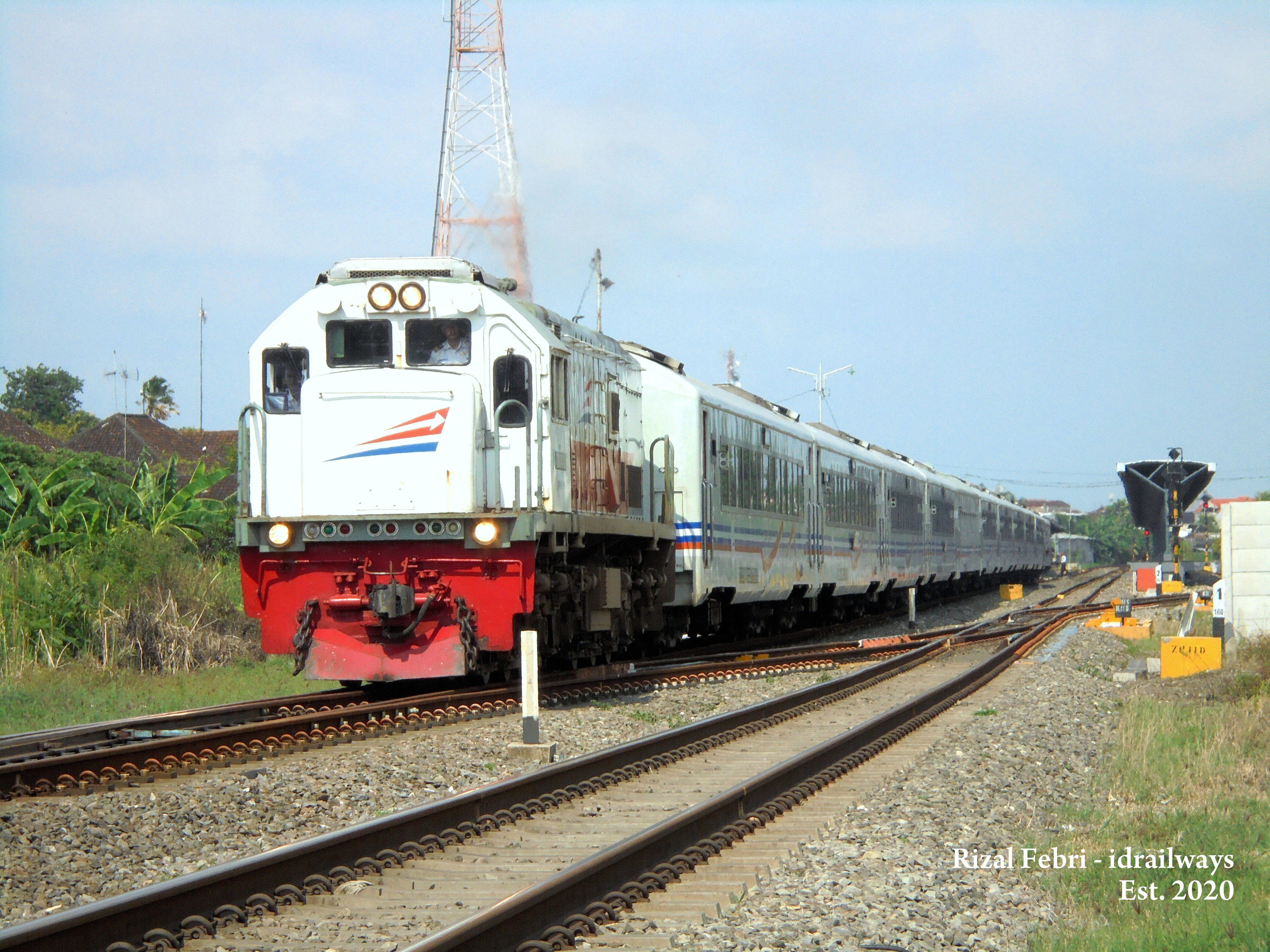 Kereta api Ambarawa Ekspres saat meninggalkan Stasiun Babat